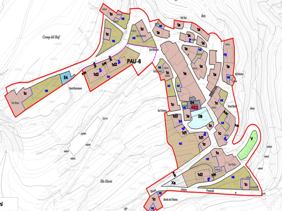 Mapa d'Ars